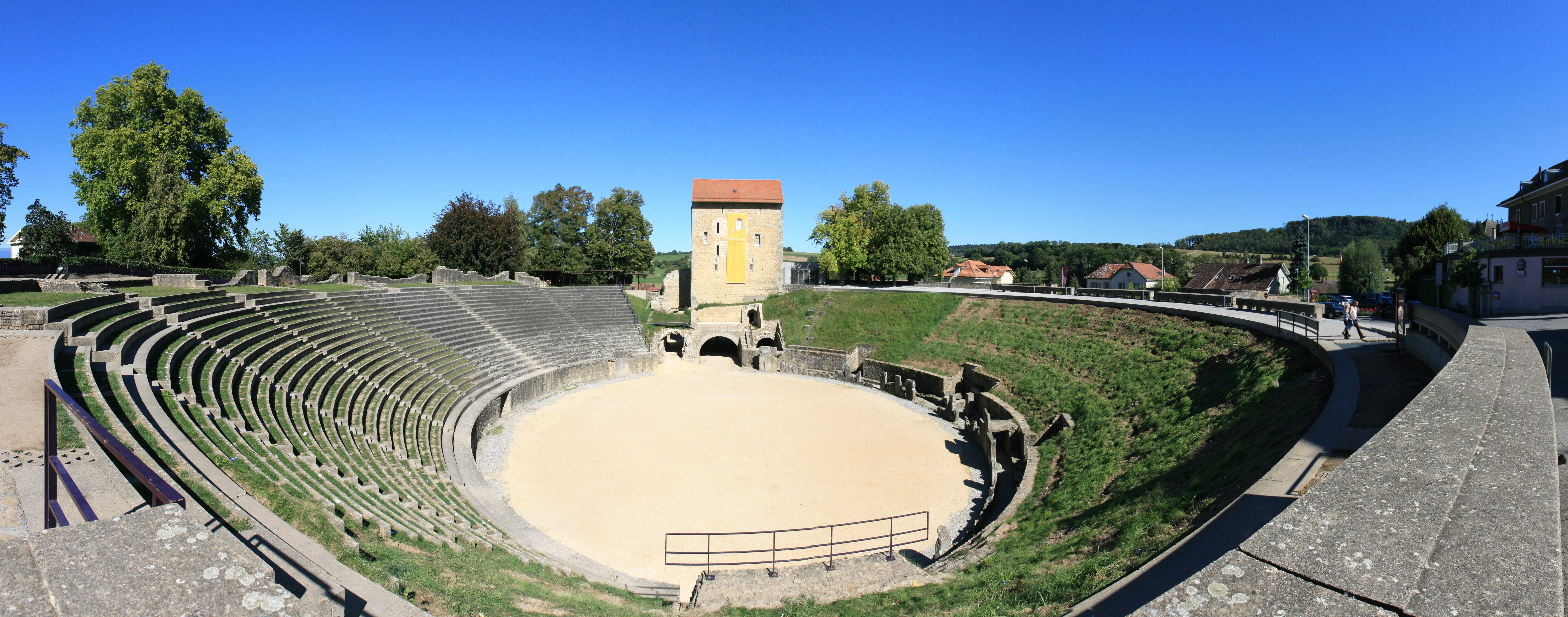 Tour de l'évèque et amphithéatre d'Avenches